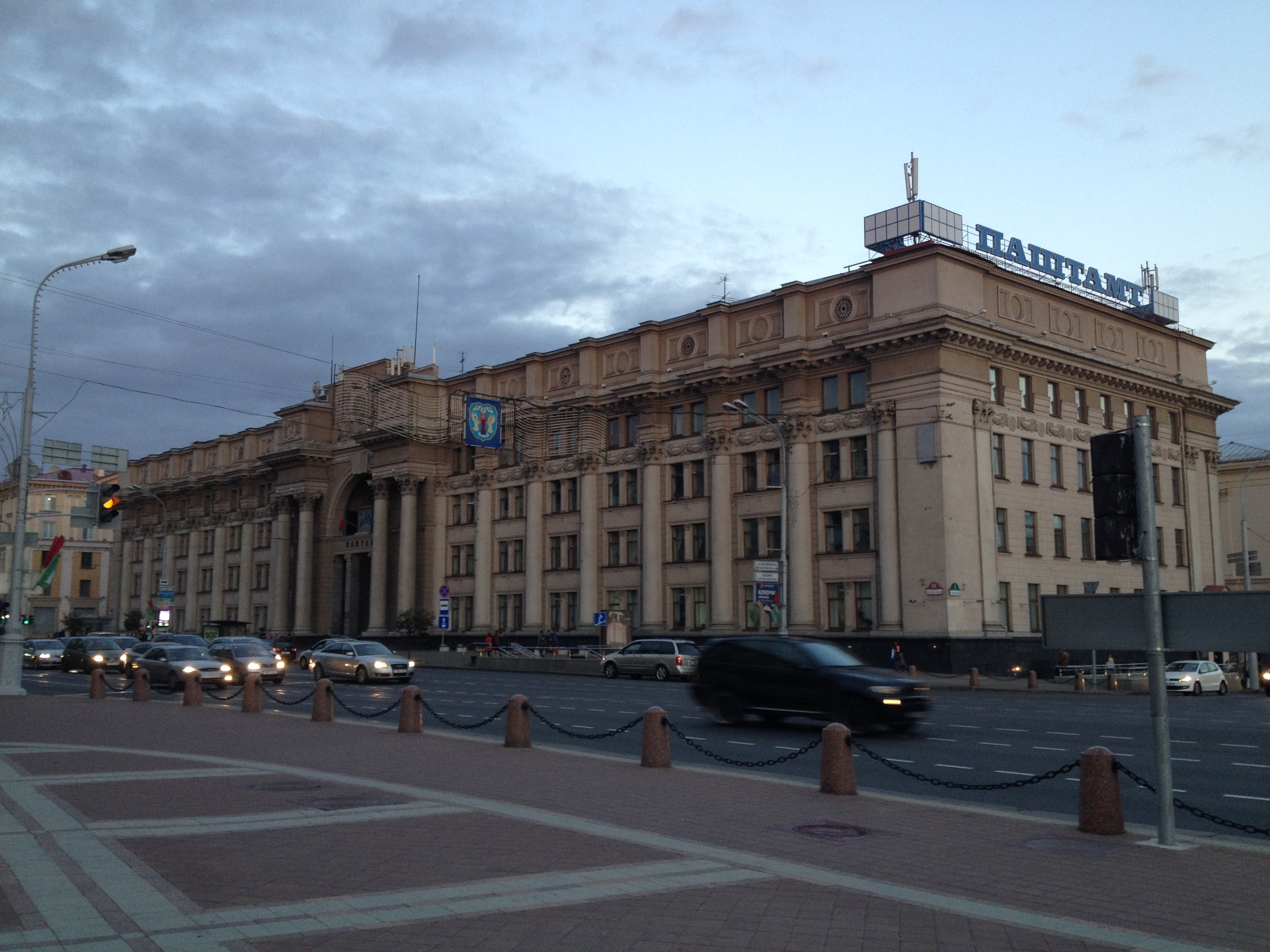 Prospekt Niezależności w Mińsku